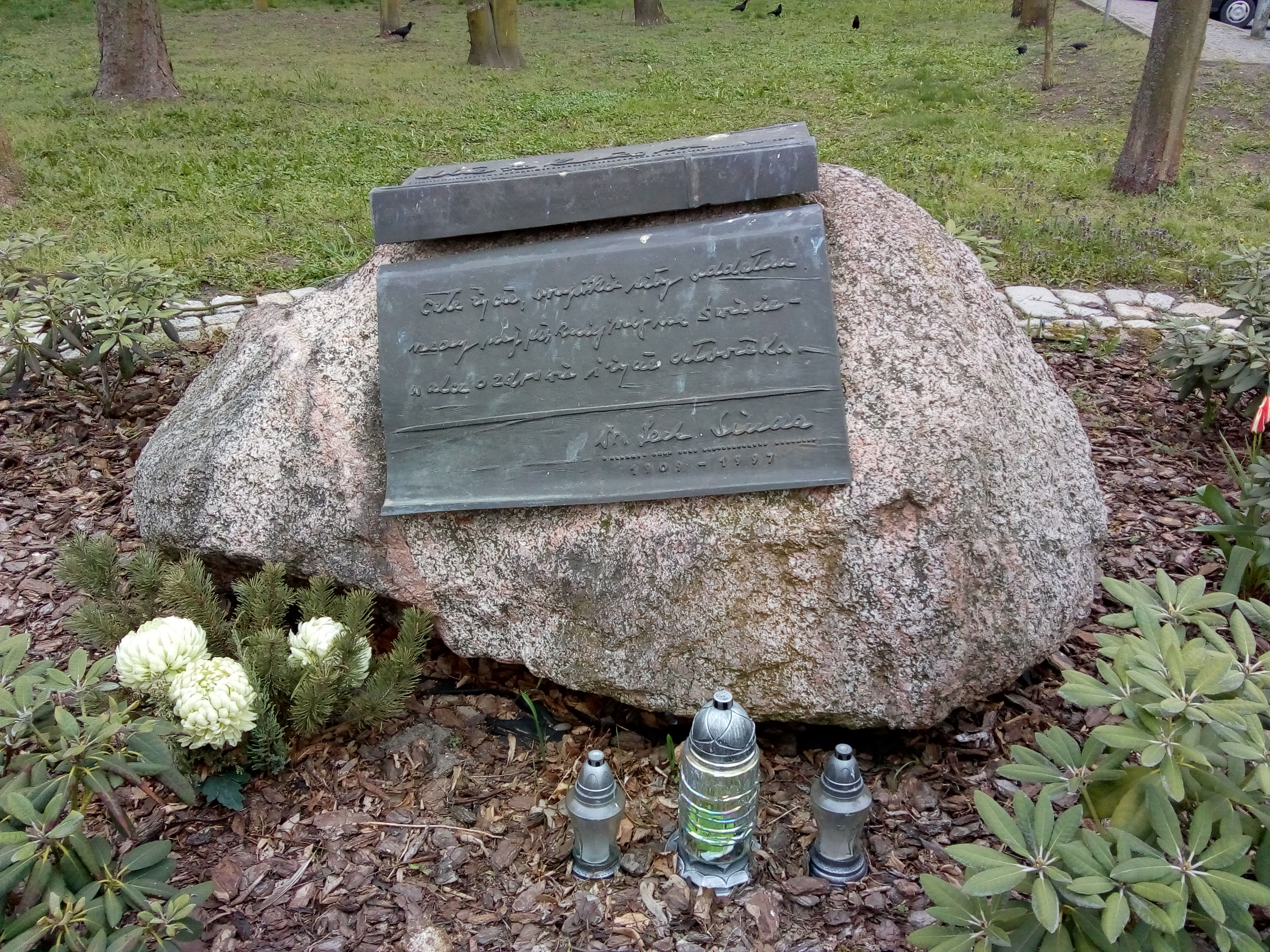 Tablica pamiątkowa Lecha Siudy w Buku (Wielkopolska)